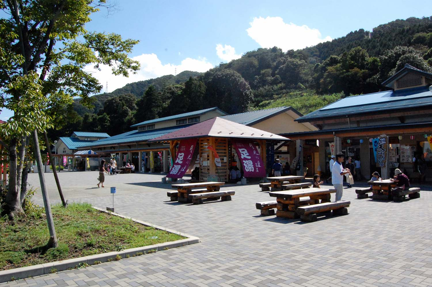 michinoeki tukiminosato nannou(道の駅月見の里 南濃),Kaizu,Gifu,Japan(岐阜県海津市)で撮影